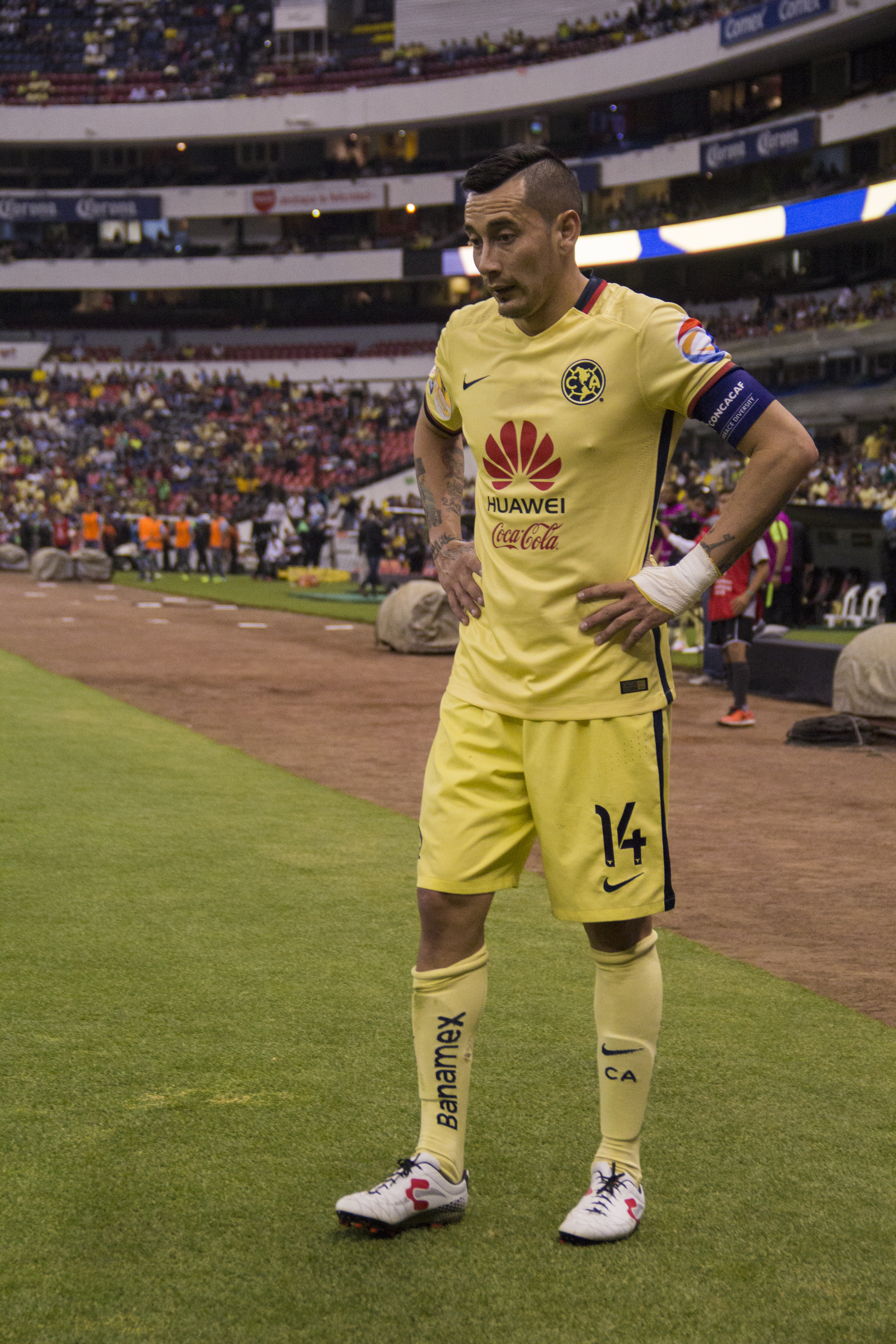 América vs Santos